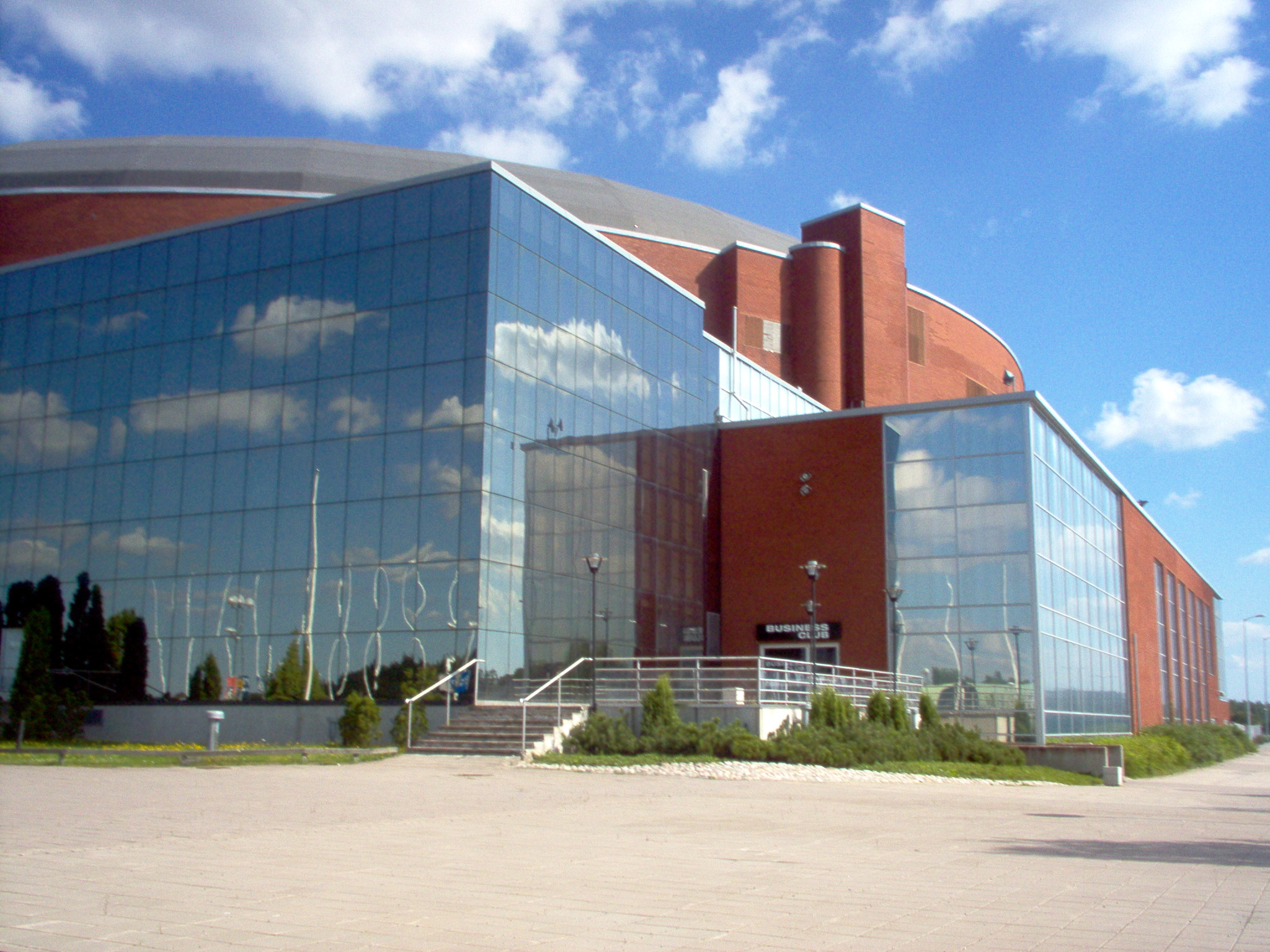 Turkuhalli